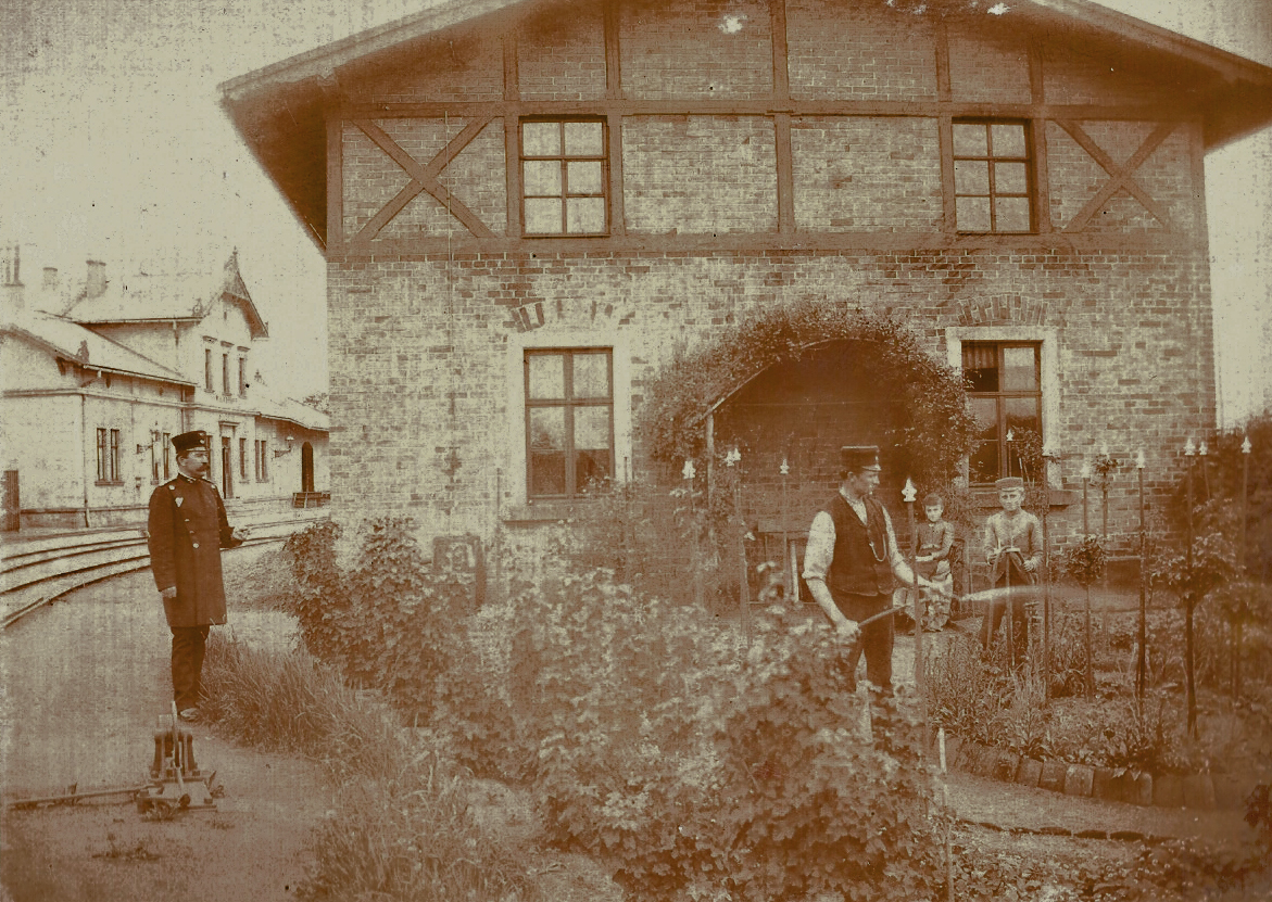 Garten des Bahnverwalters am alten Heizhaus.